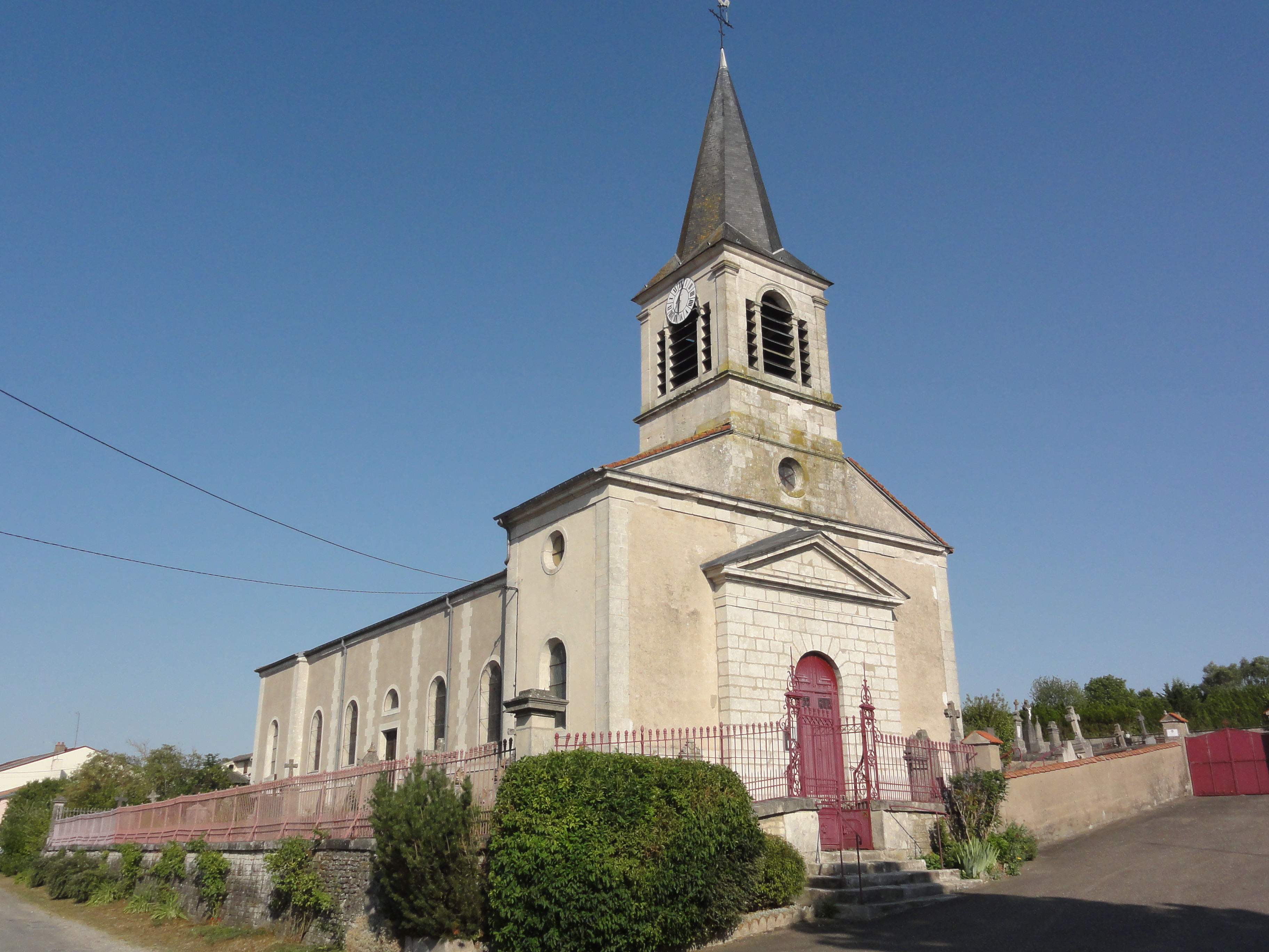 Fromeréville (Meuse) église